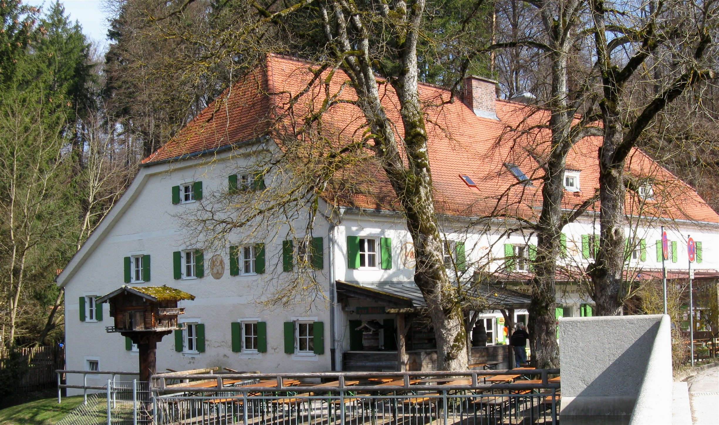 Straßlach-Dingharting, Mühltal; Haus Nr. 10; Gasthaus zur Mühle (Beim Untermüller), zweigeschossiger Putzbau mit Halbwalmdach und Medaillonmalereien, bez. 1807